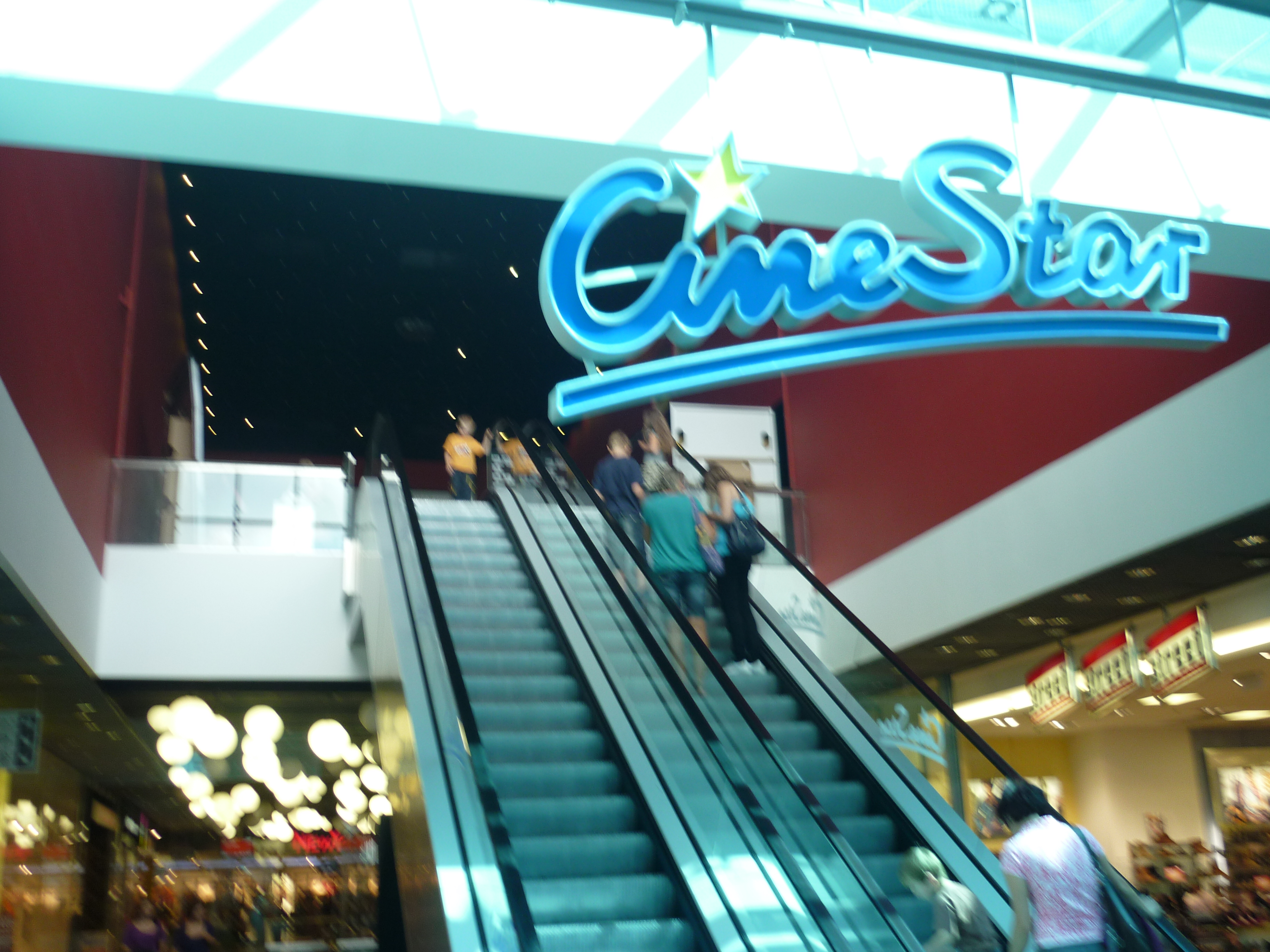 Cinestar v CPJ